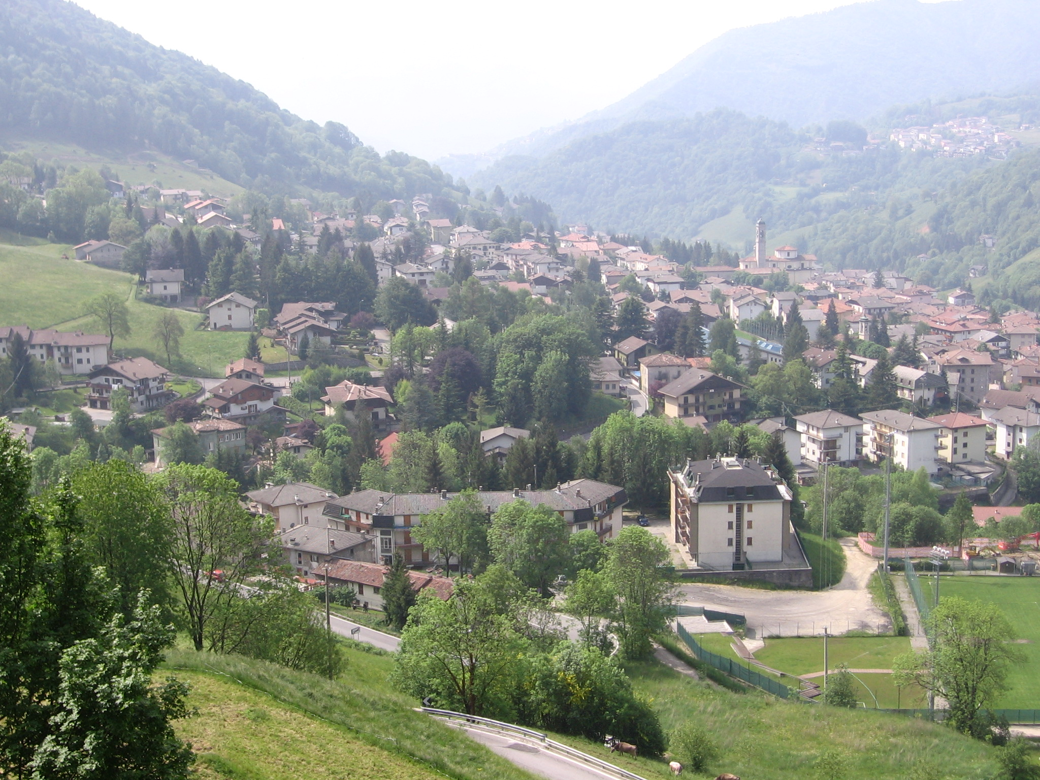 Serina, Bergamo, Italia